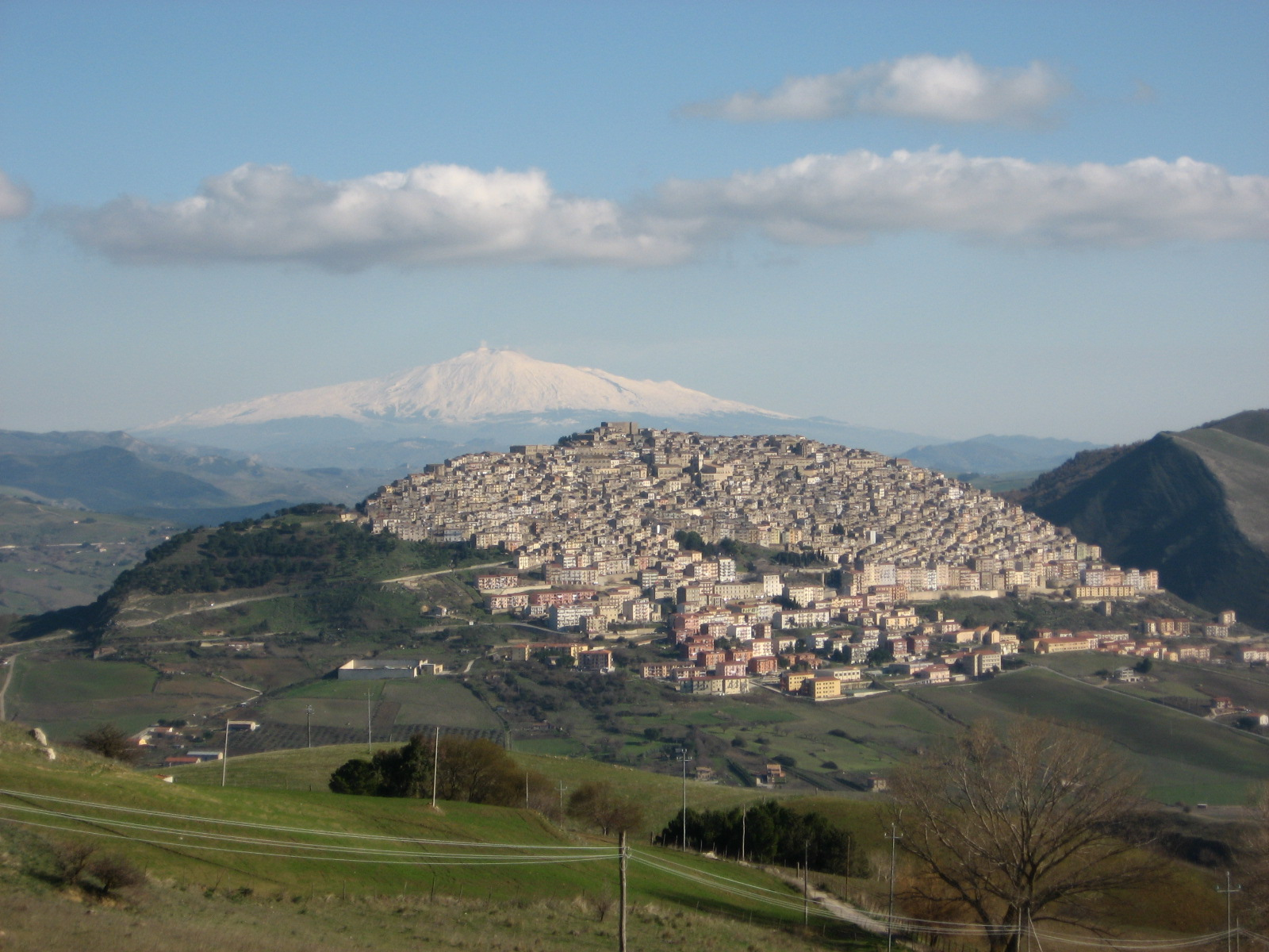 Panorama Gangi e Etna